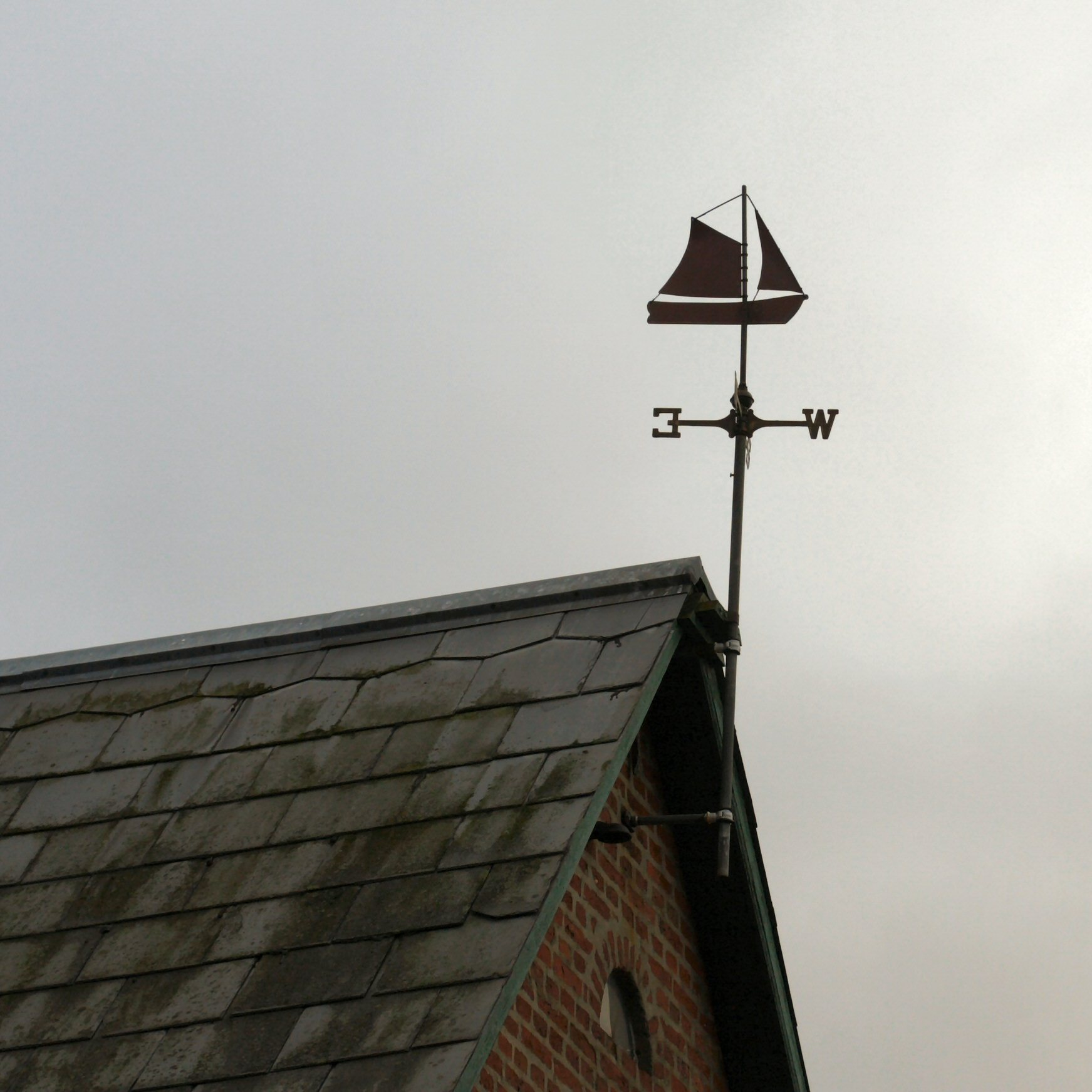 vindfløj som skib på Fanø